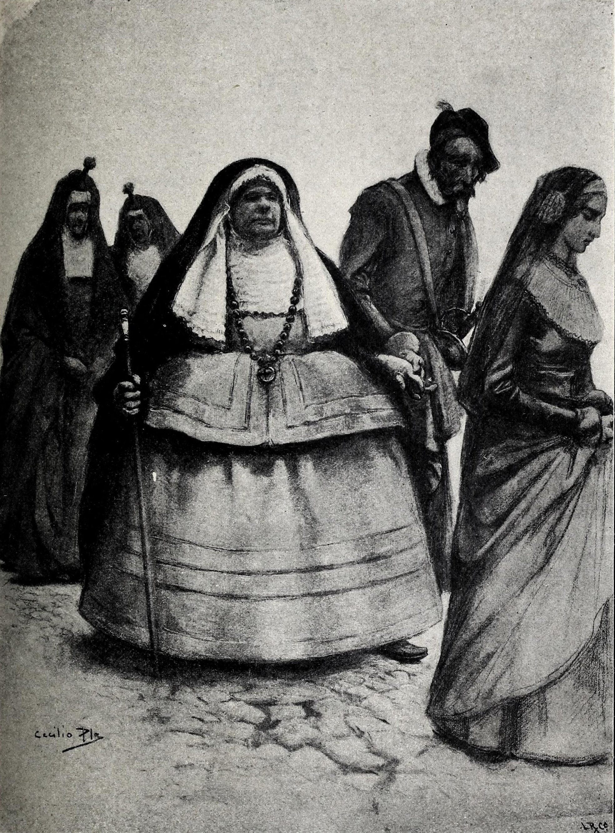 Creaciones femeninas IX. La tía fingida.